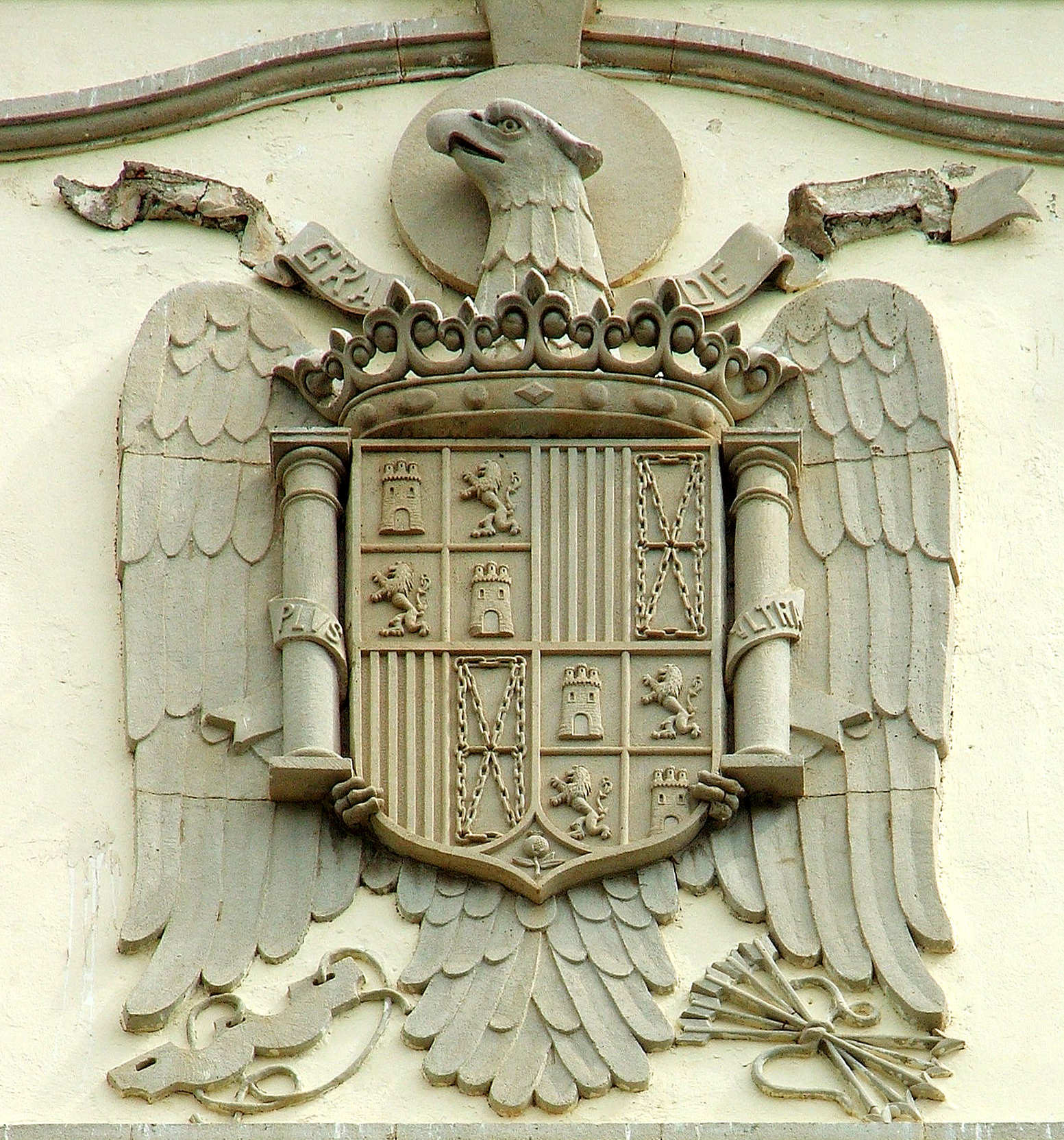 Wappen an der Fassade Post von La Orotava auf Teneriffa. Das Wappen wurde im Jahr 2007 durch das Zeichen der Post (Correos) ersetzt. Die Einheit (uno) und die Freiheit (libre) des Wahlspruches waren 2007 bereits durch Korrosion runtergebröselt. Nur die Größe (Grande) war noch vorhanden.